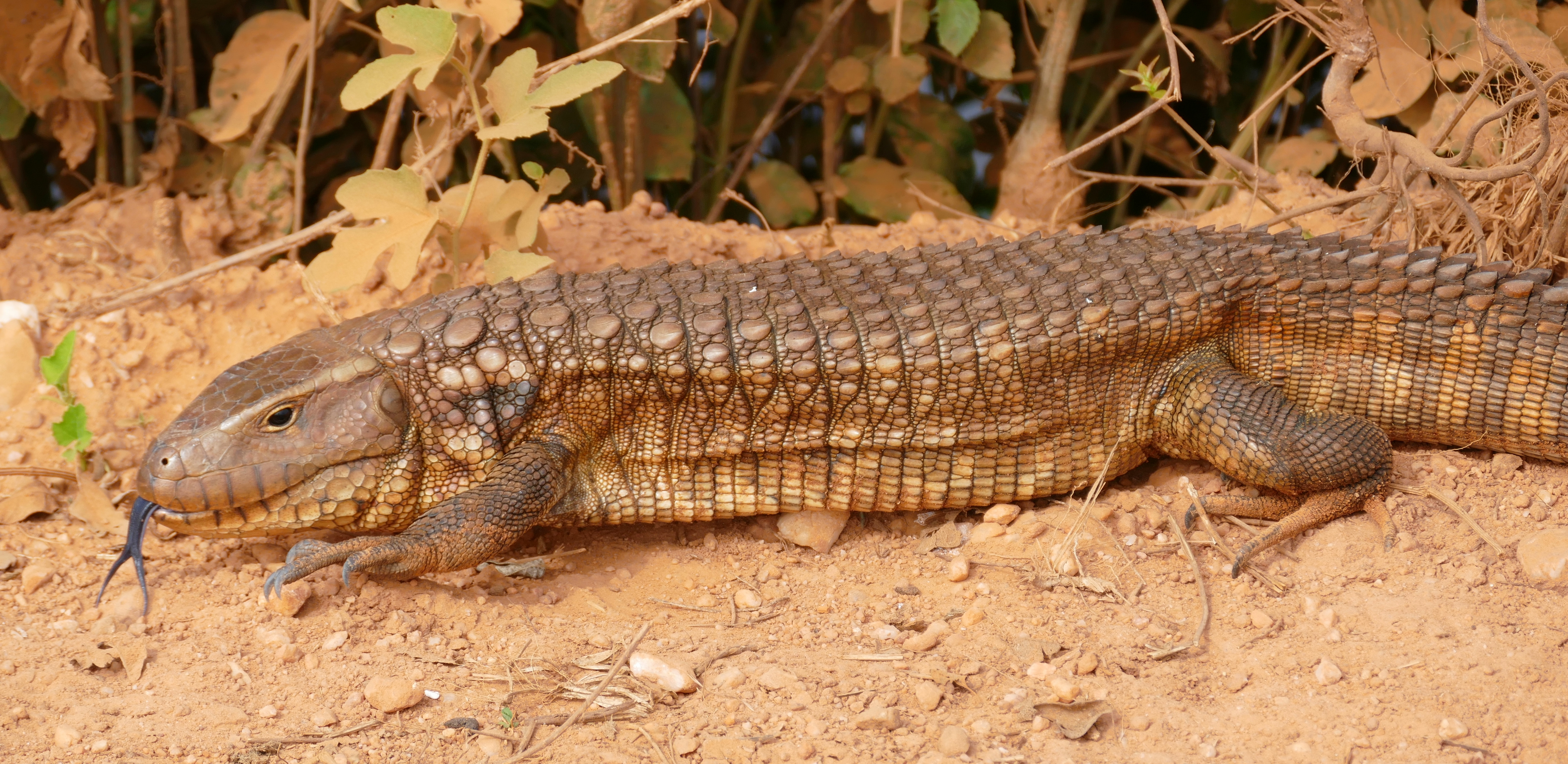 Transpantaneira, Poconé, Mato Grosso, BRAZIL